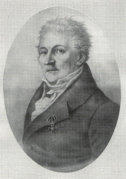 Wilhelm Josephi (1763-1845), Mediziner Rostock